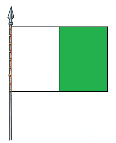 Bandiera del Comune di Pieve di Teco, Liguria, Italia